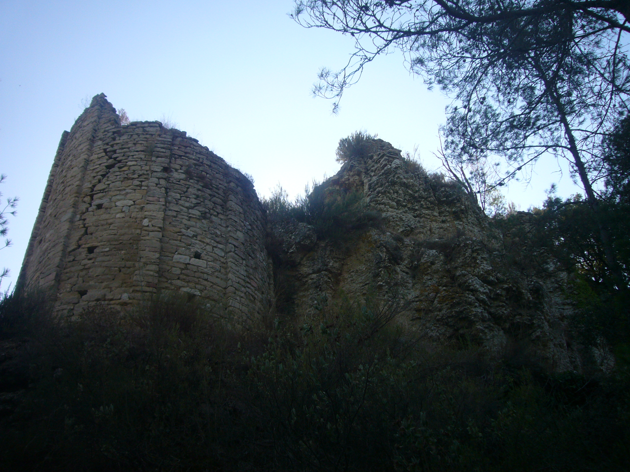 Cara nord de l'absis de l'església romànica del Castell de Castellolí vist des de l'obaga del turó del castell